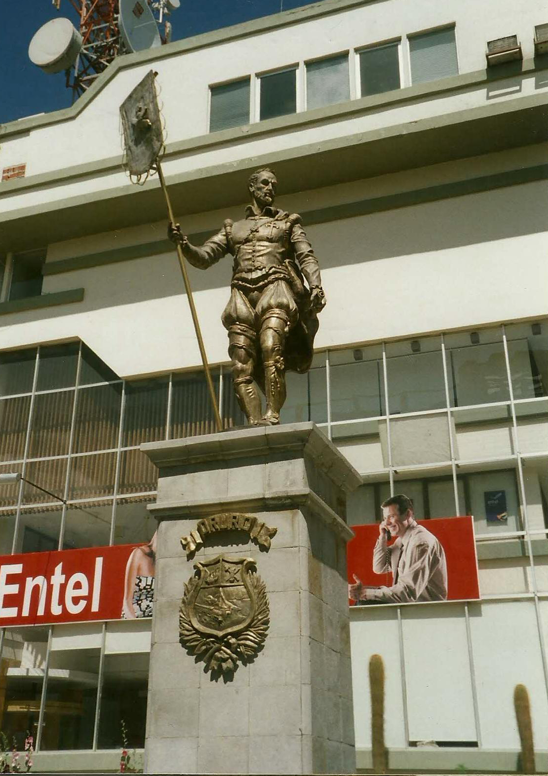 Monumento actual en Oruro a Manuel de Castro y Padilla, fundador de la Villa de San Felipe de Austria, primitivo nombre de la ciudad.